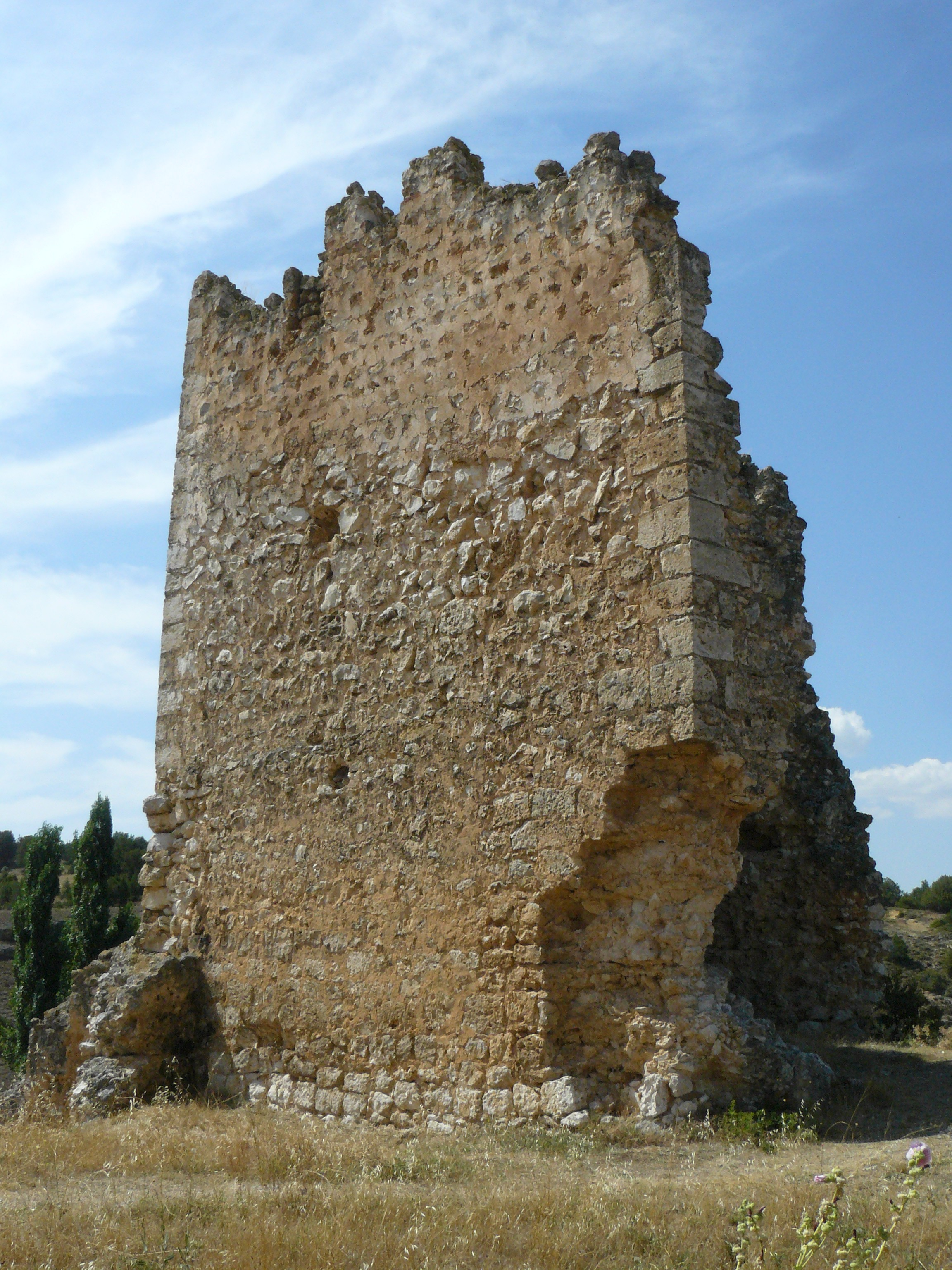 Ruinas de torre del castillo de Castillejo de Robledo.